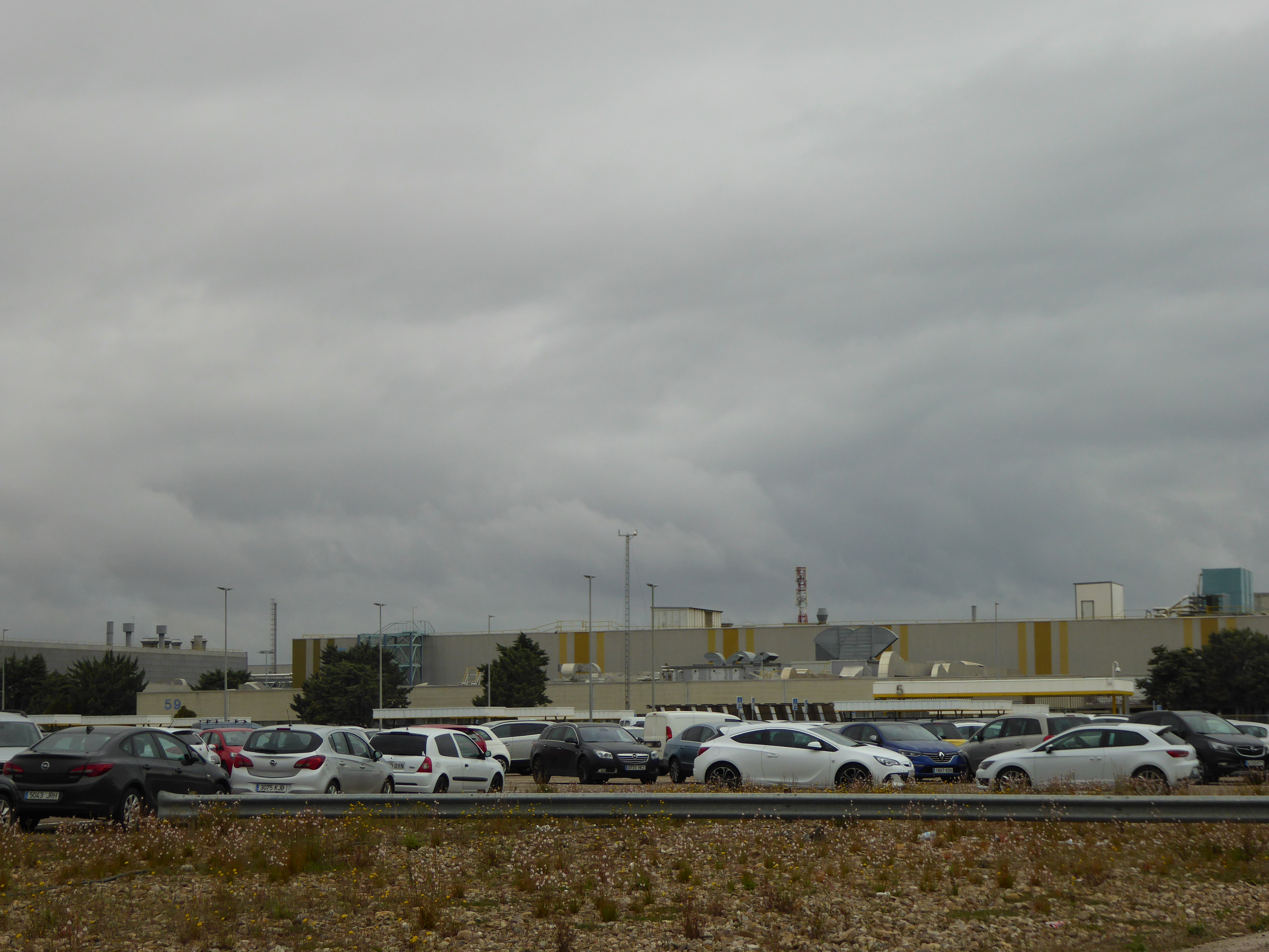 Figueruelas